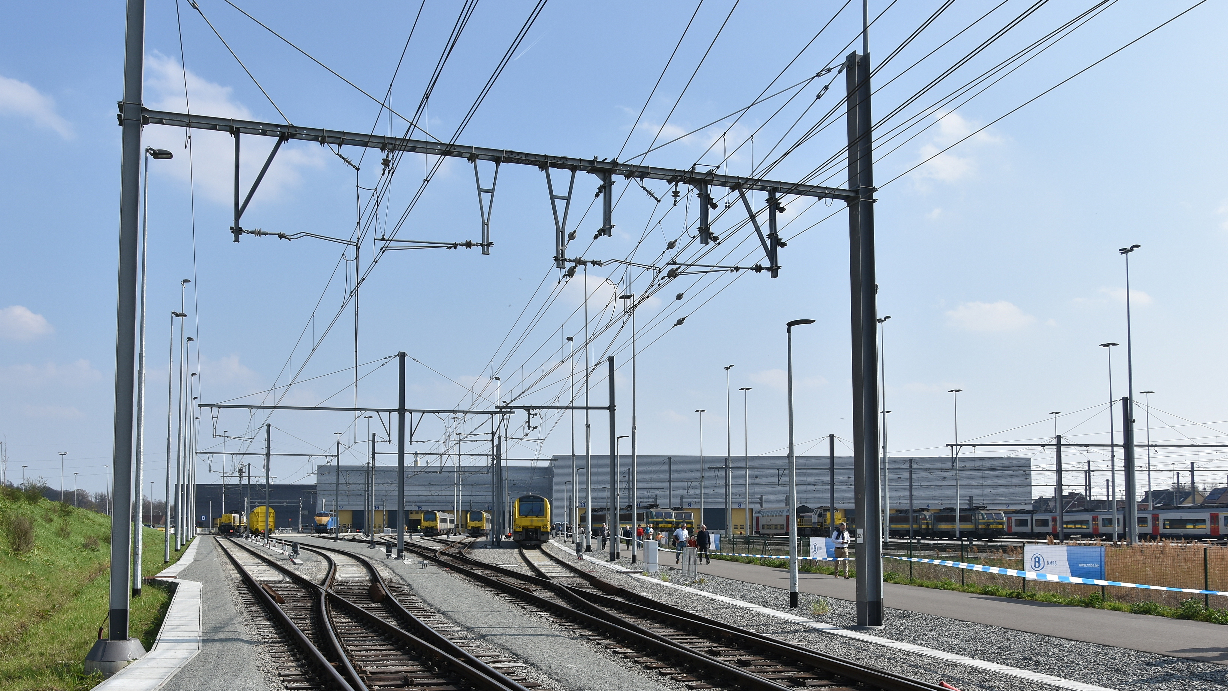 NMBS - Polyvalente werkplaats Melle 30-03-2019 14-24-05